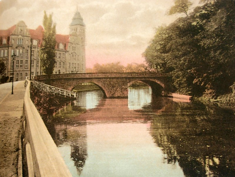 Most Władysława IV w Bydgoszczy (1841-1972)